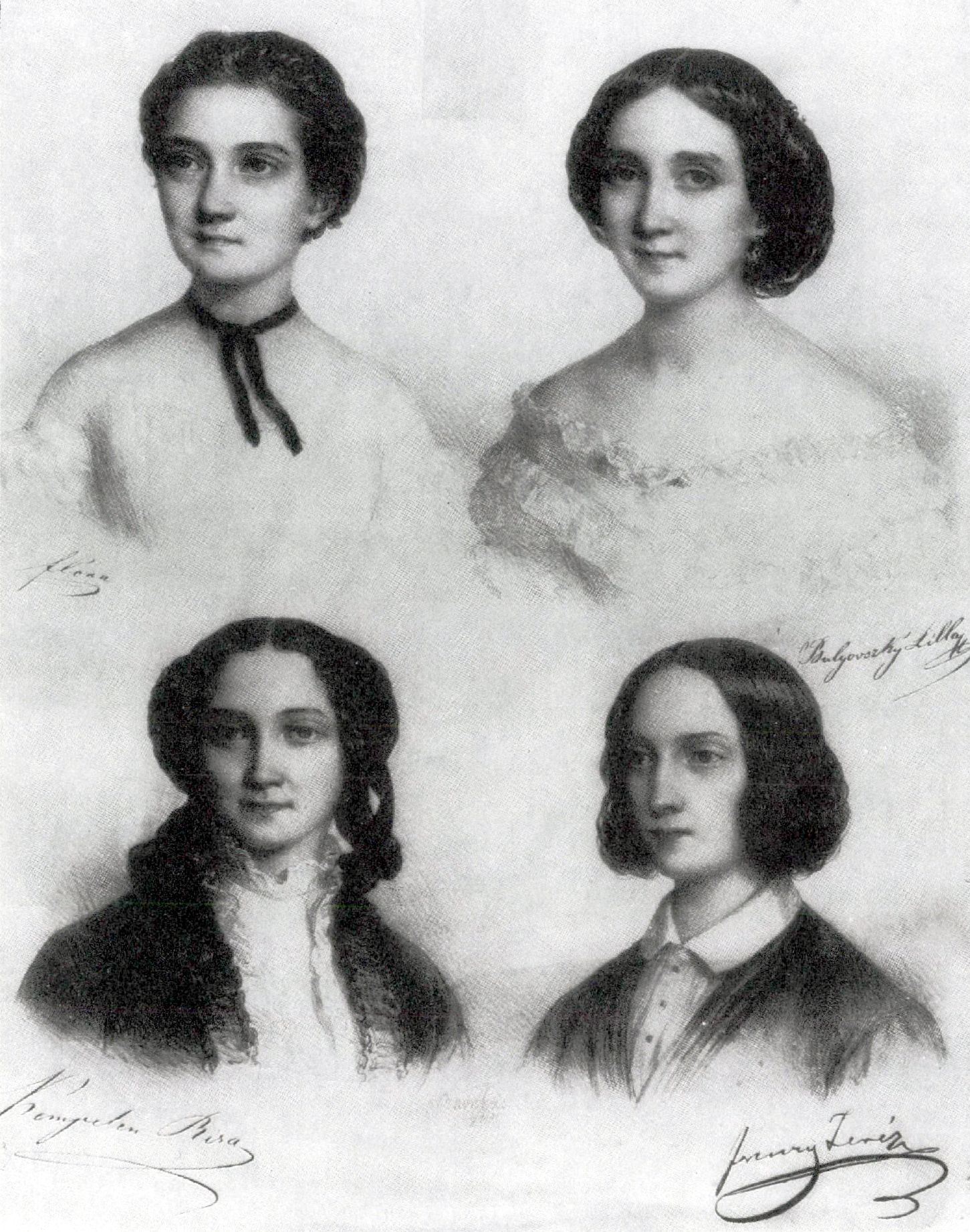 Flóra: Majthényi Flóra? (1837–1915) költőnő, Tóth Kálmán felesége, Bulyovszkyné Szilágyi Lilla (1833–1909) színésznő, a márciusi ifjak egyike, Kempelen Riza (1829–1858) Tóth Riza írónő, Tóth Kálmán testvére, Ferenczy Teréz (1823–1853) költőnő